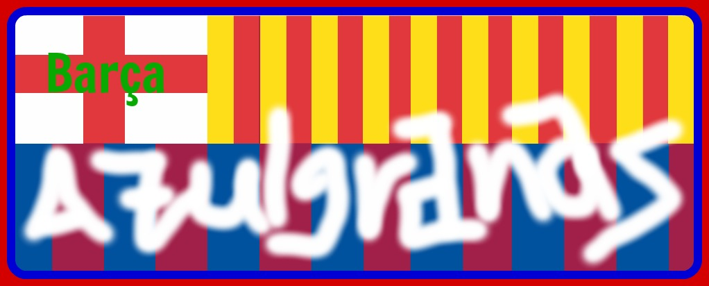 شعار برشلونة الجماهيري